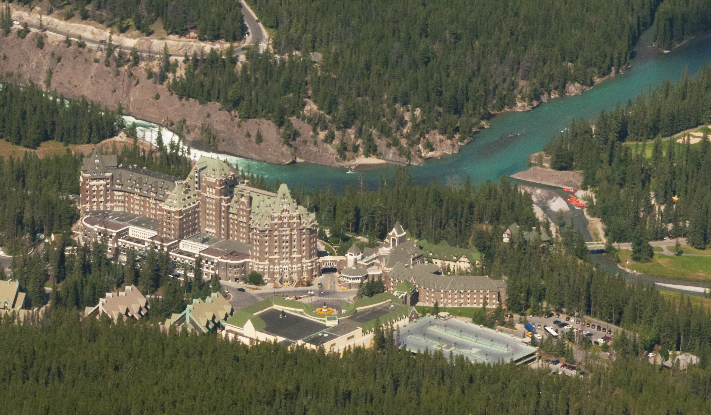 Lieu historique national du Canada de l'Hôtel Banff Springs